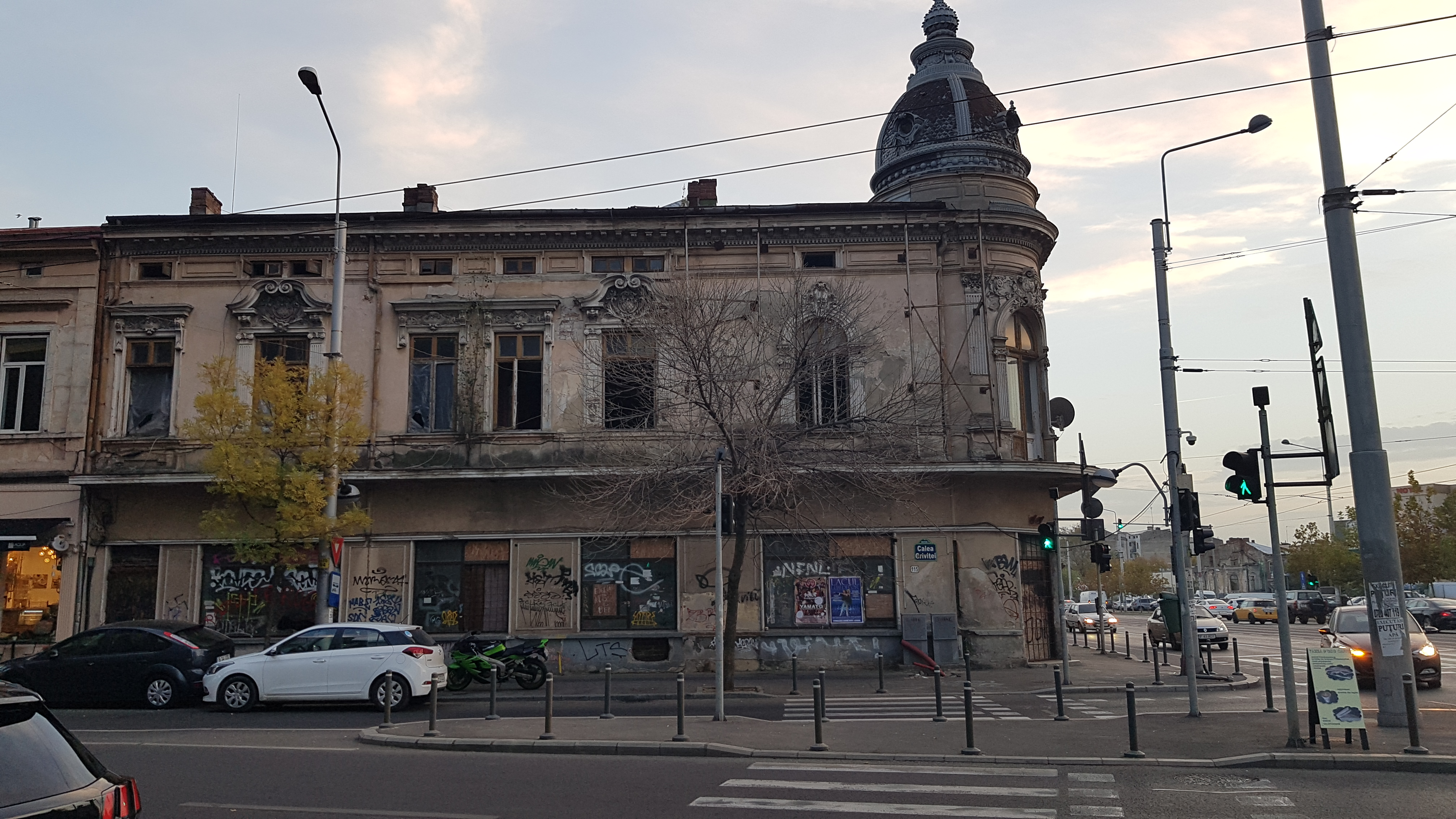 Casa Dimitrie Petrescu